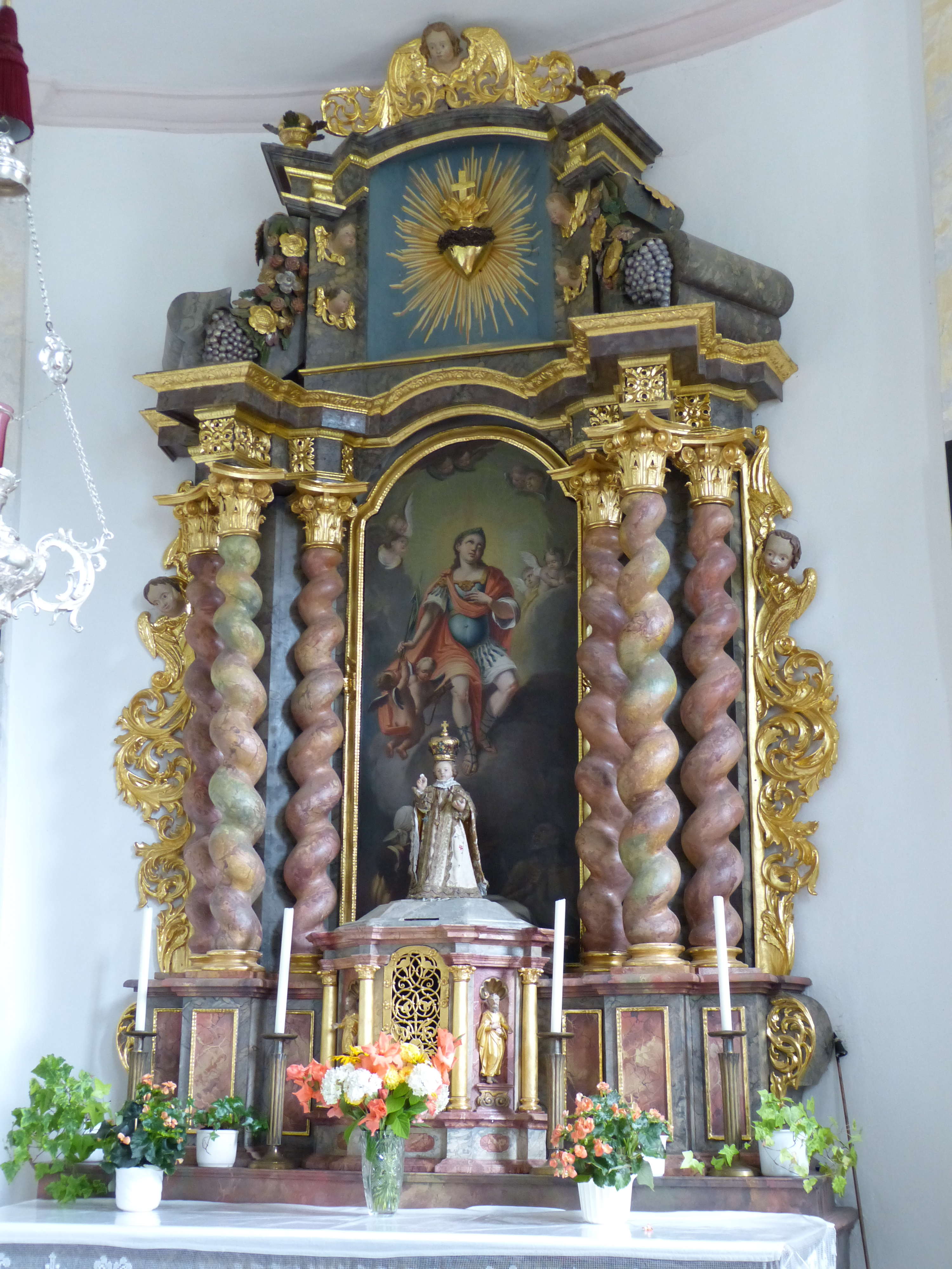 Kapelle St. Sebastian, Sankt Sebastian, Landkreis Unterallgäu, Bayern